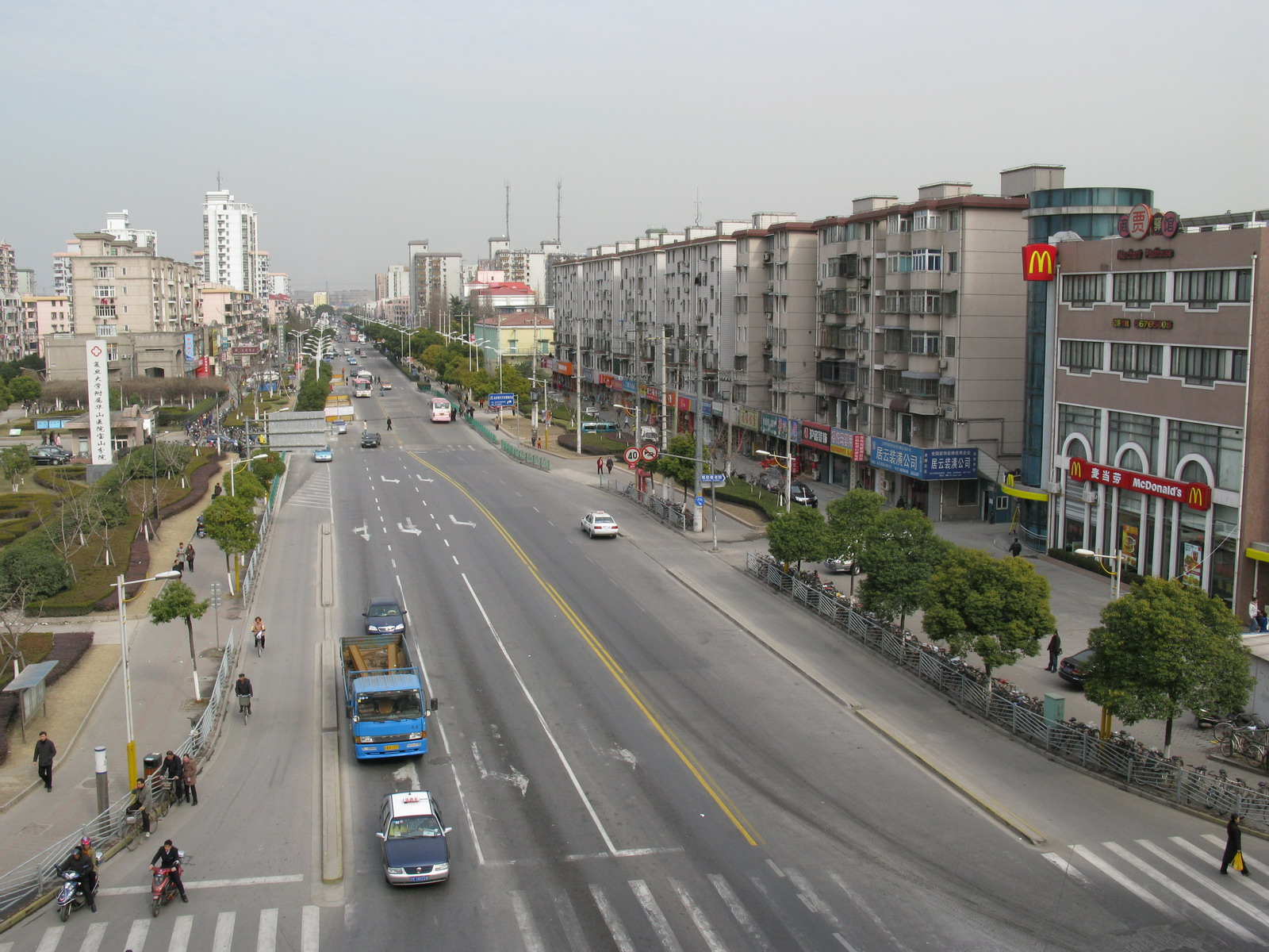 长江西路 共和新路 Changjiang Road (W), Gonghexin Road